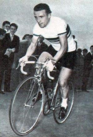 Stan Ockers, 'Sprint 71', Panini figurina n°229.